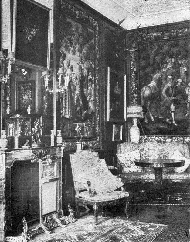 Zámek Dobříš - kulečníkový sál s gobelíny (1918)